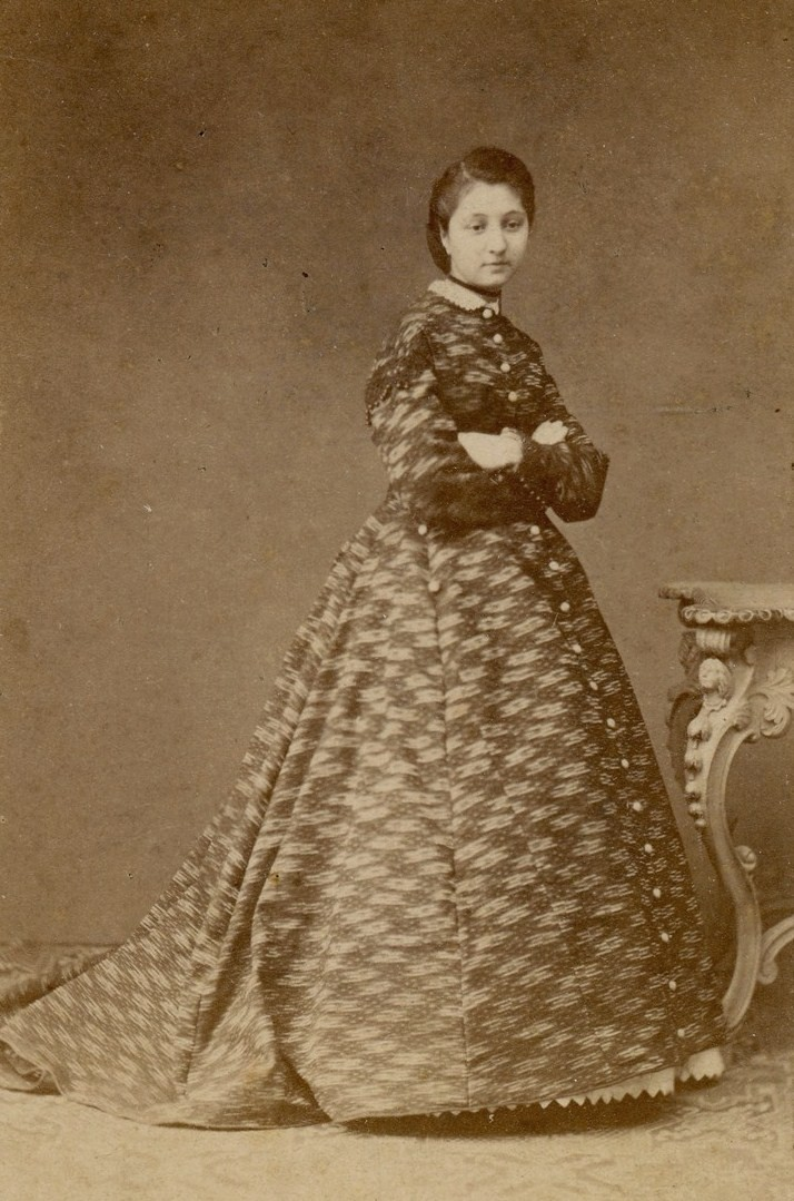 Княжна Нино Михайловна Шервашидзе (1850—1868), дочь Михаила Георгиевича Шервашидзе, умерла от туберкулеза.